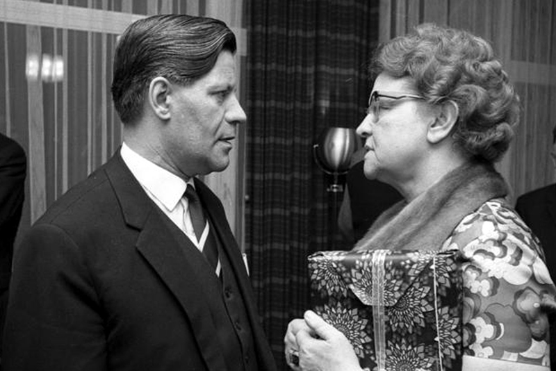 Empfang der LaVertr. Niedersachsen anl. Geburtstag von Frau Ministerin Maria Meyer-Sevenich (v.l.n.r.: SPD-Fraktionsvorsitzender Helmut Schmidt, Frau Minister Meyer-Sevenich, SPD-Bundesschatzmeister Alfred Nau)